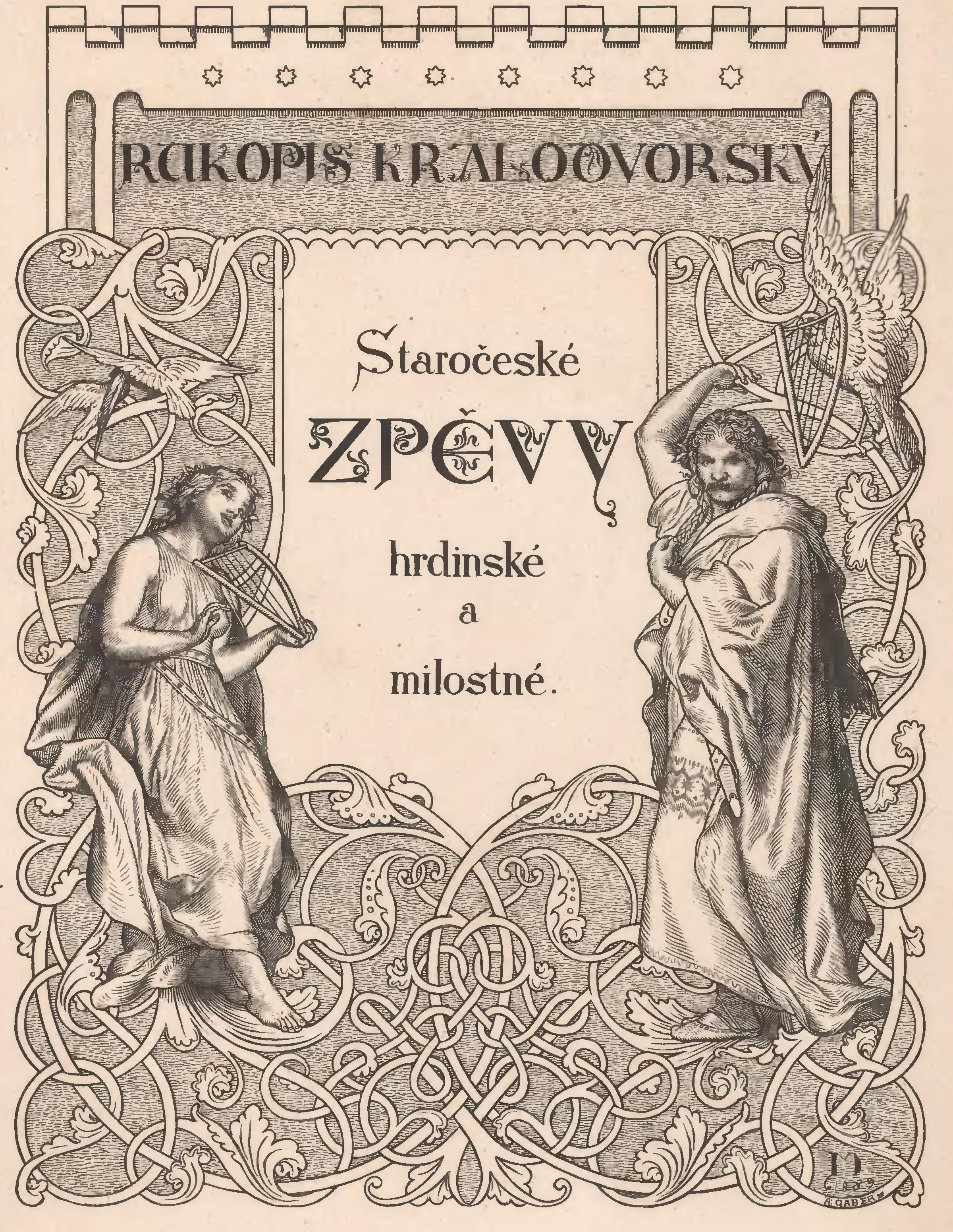 Illustration of Rukopis královédvorský